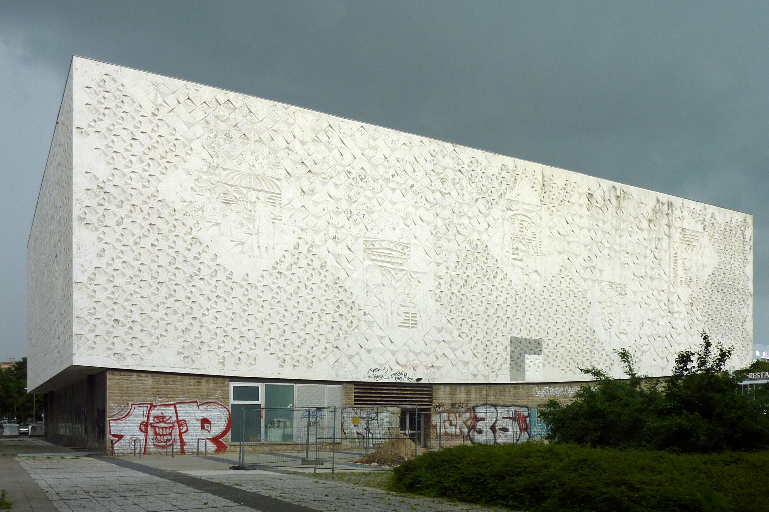 Kino International in Berlin-Mitte, Westfassade. Betonrelief von Waldemar Grzimek, Hubert Schiefelbein und Karl-Heinz Schamal. Sockel mit früherem Eingang der Stadtteilbibliothek.